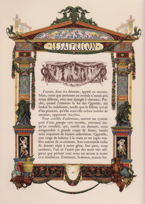 Illustration du Satyricon de Pétrone par Georges-Antoine Rochegrosse : exemple d'une page encadrée.